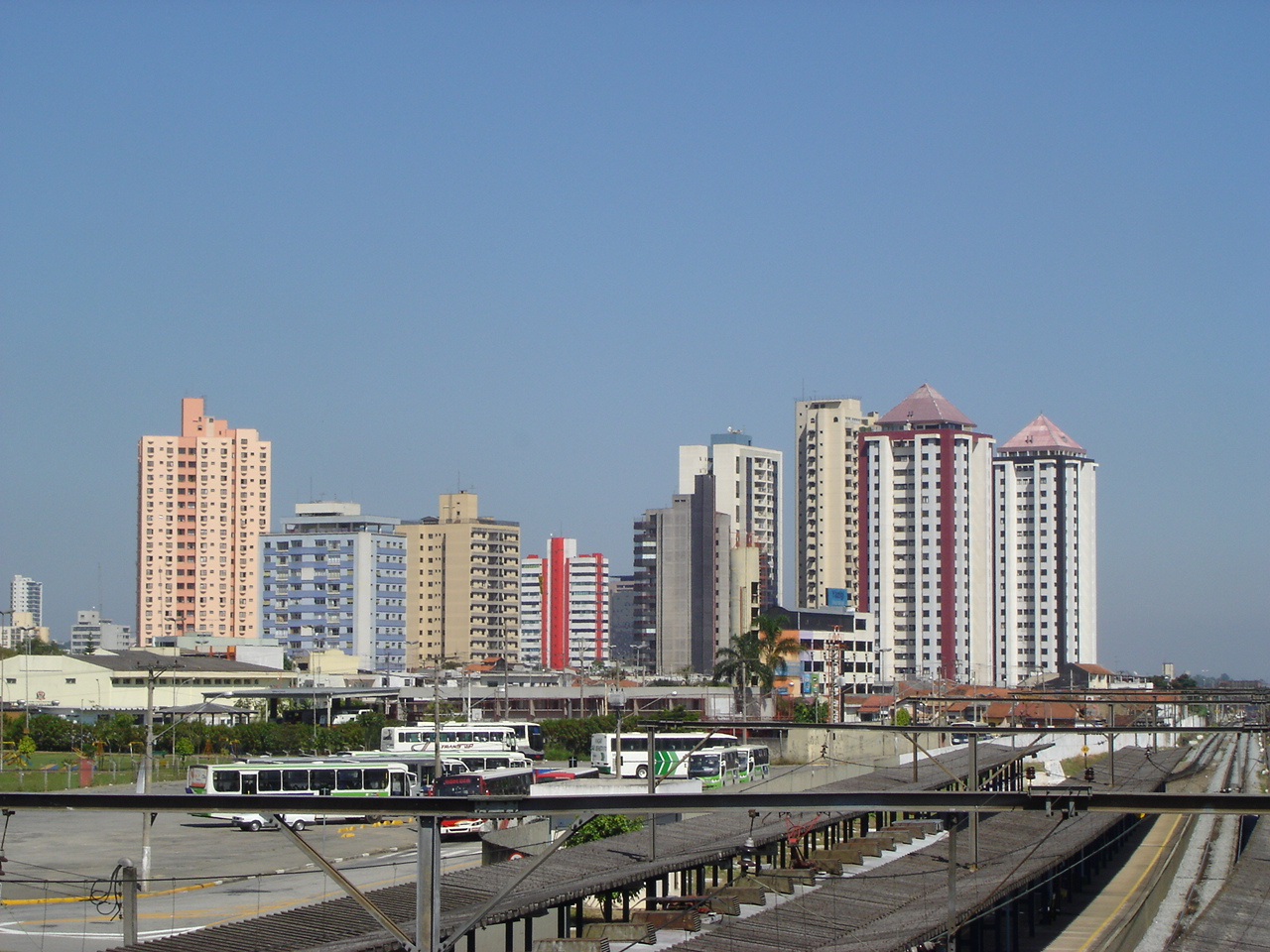 Imagem da cidade de Mogi das Cruzes.